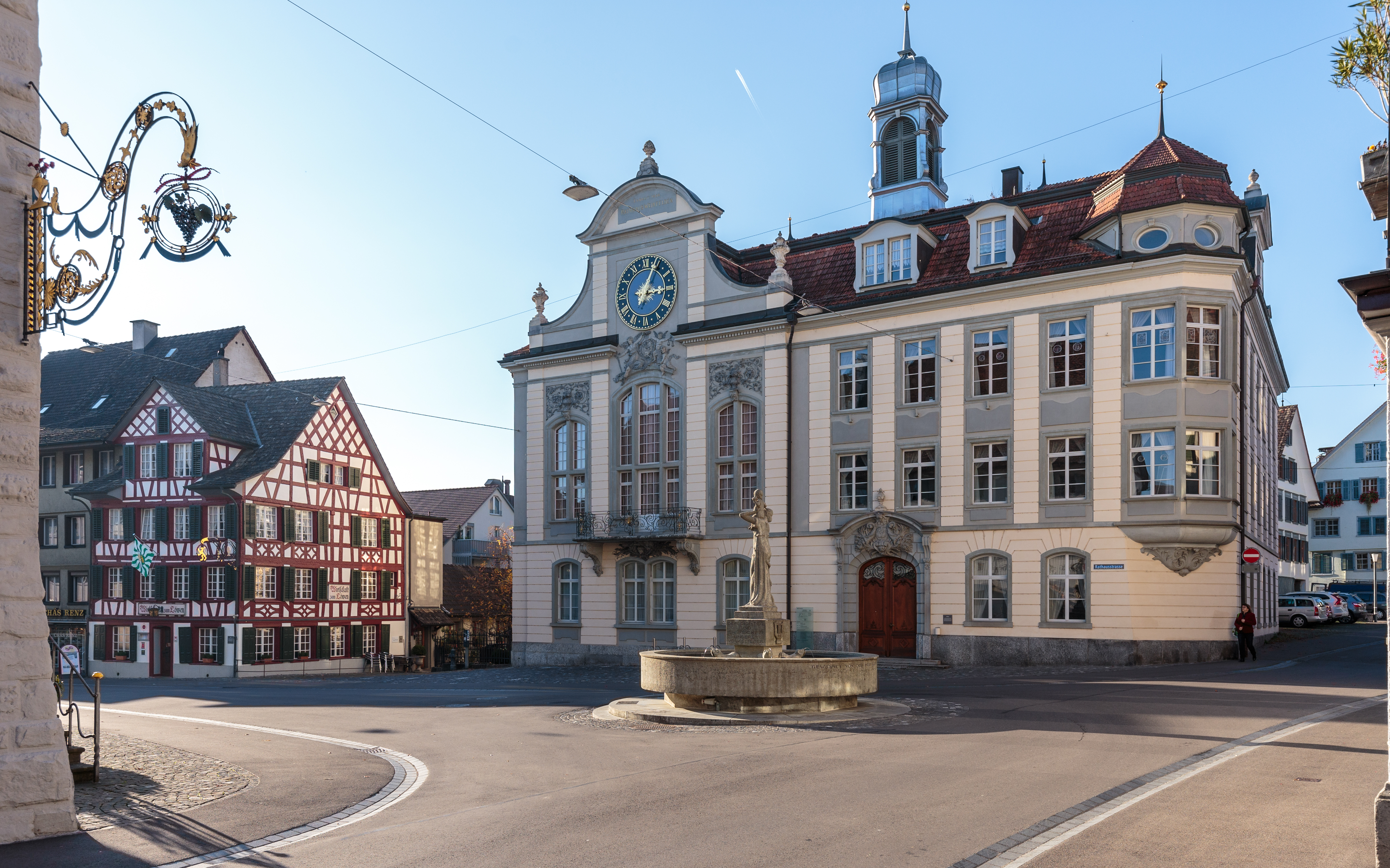 Weinfelden: Rathaus, Thomas-Bornhauserbrunnen und Wirtschaft zum Löwen